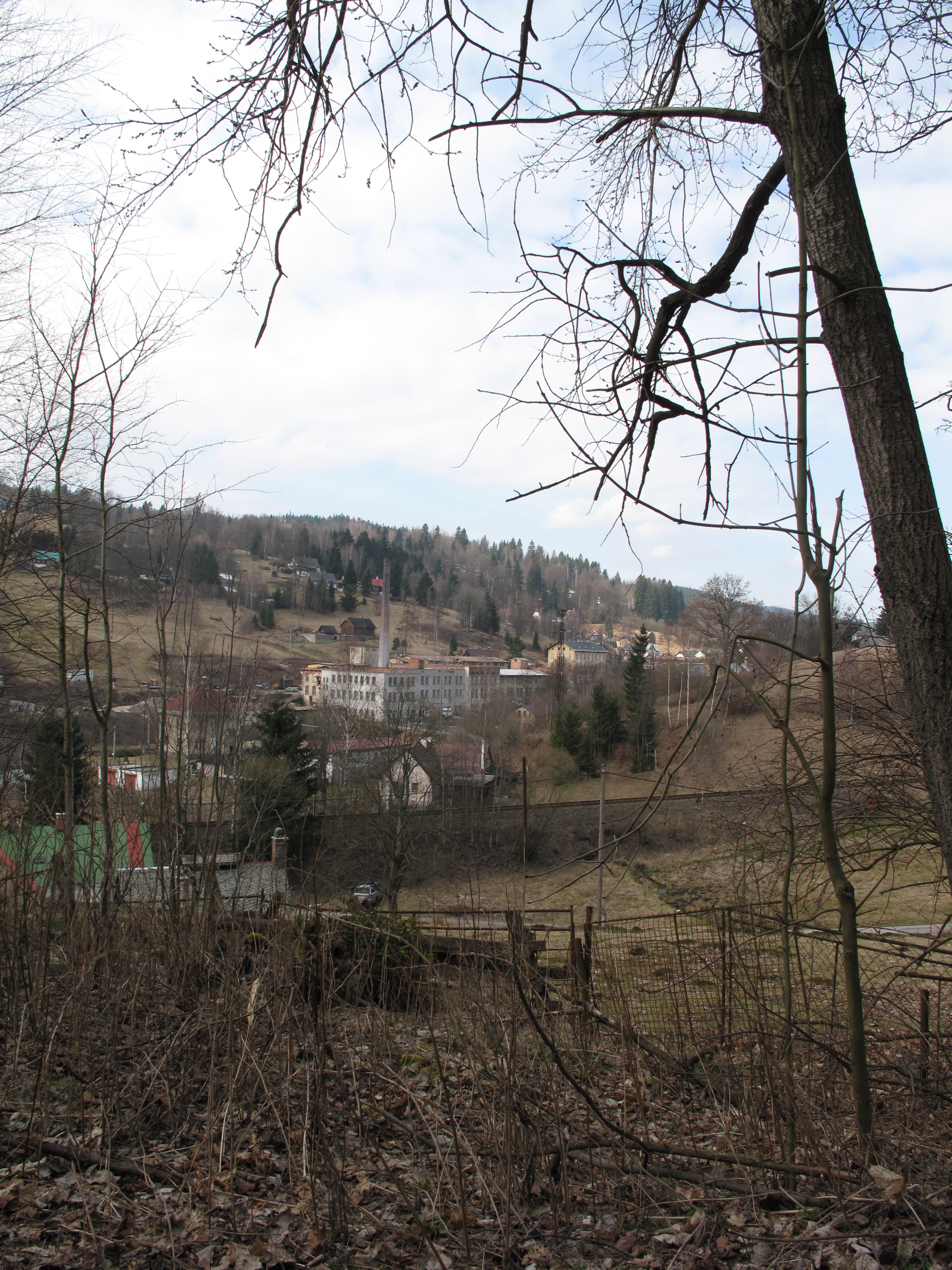 Pohled v Antonínově. Okres Jablonec nad Nisou, Česká republika.